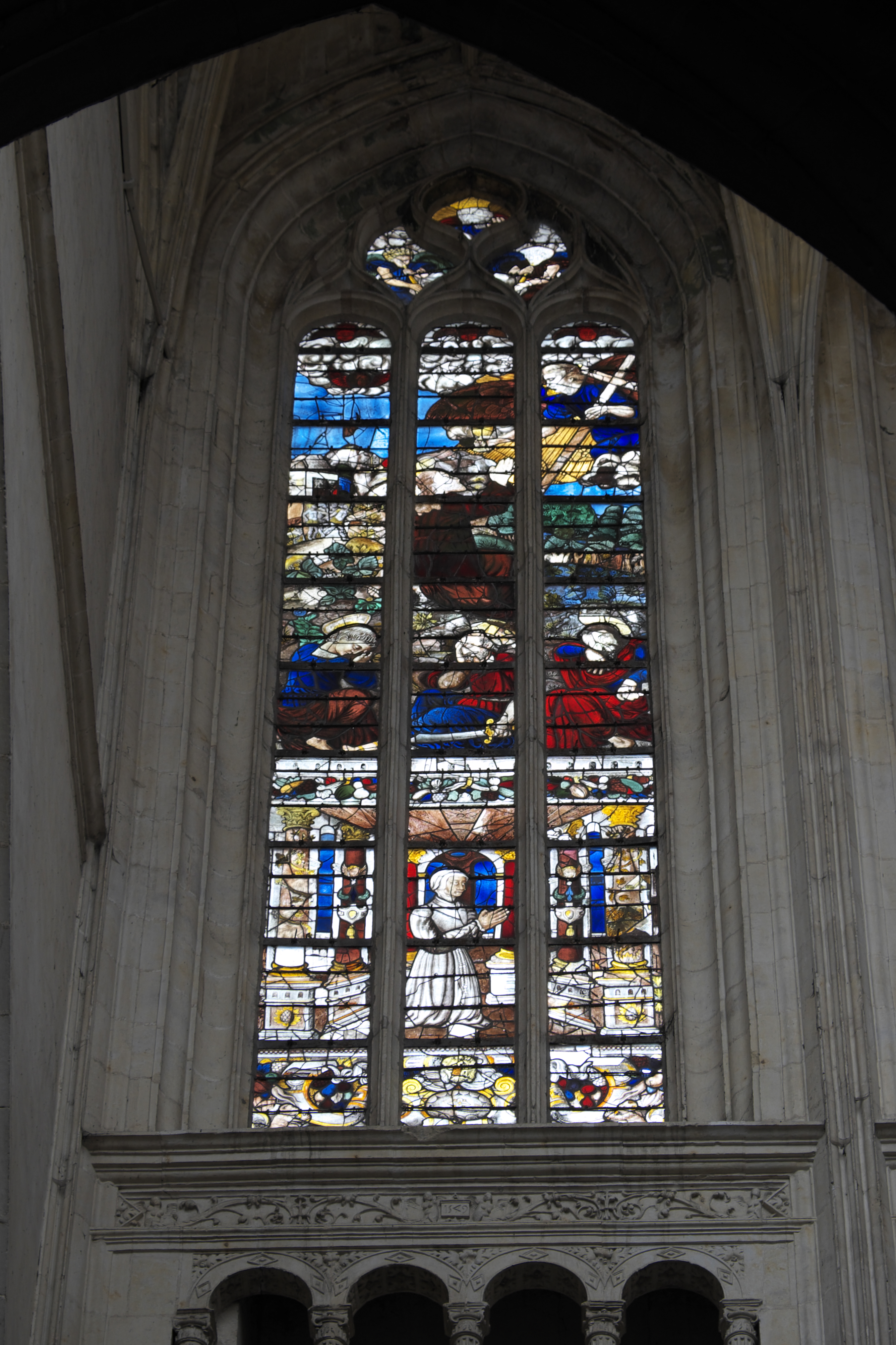 Katholische Pfarrkirche Notre-Dame-des-Marais in La Ferté-Bernard im Département Sarthe (Pays de la Loire/Frankreich), Bleiglasfenster um 1600; Darstellung: Jesus und die schlafenden Jünger am Ölberg, unten Stifterin